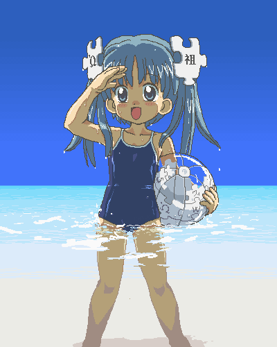 A Wikipe-tan